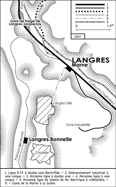 Schéma du complexe ferroviaire de Langres (FR-52)